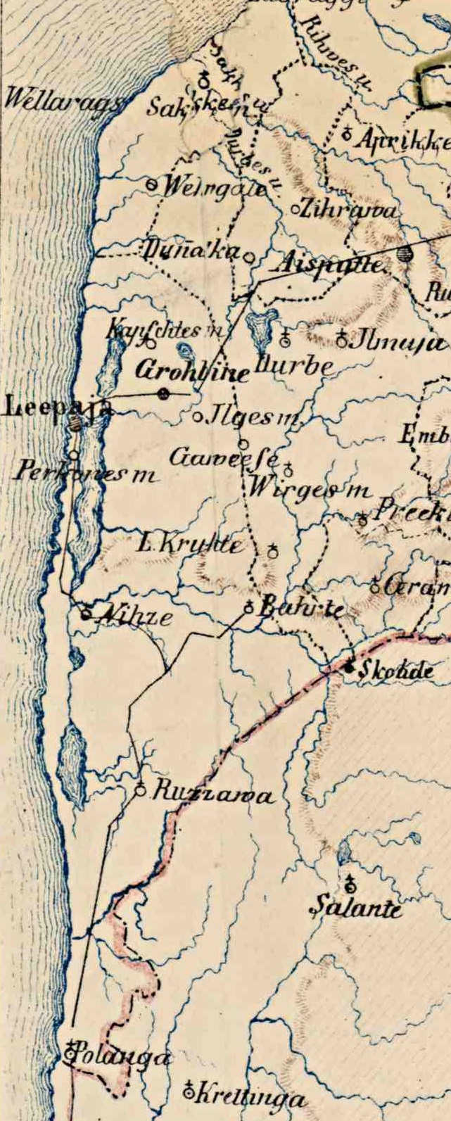 Grobiņas apriņķis 1859. Izgriezts no Lantkahrte no Latweeschu semmes 1859.jpg